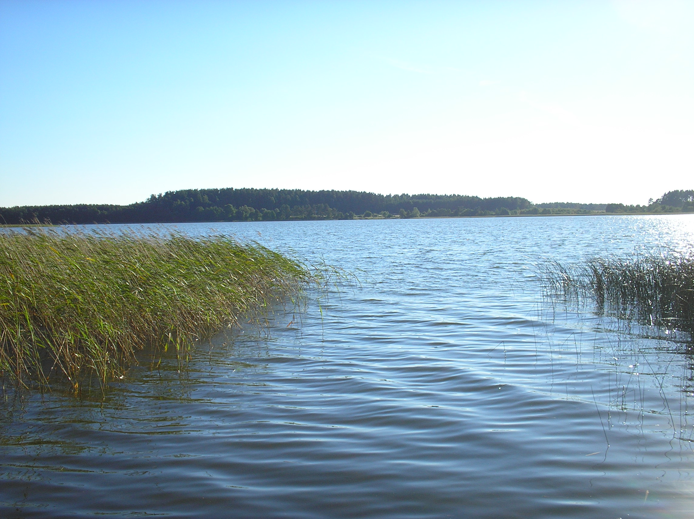 Jezioro Dybowskie położone na Pojezierzu Ełckim